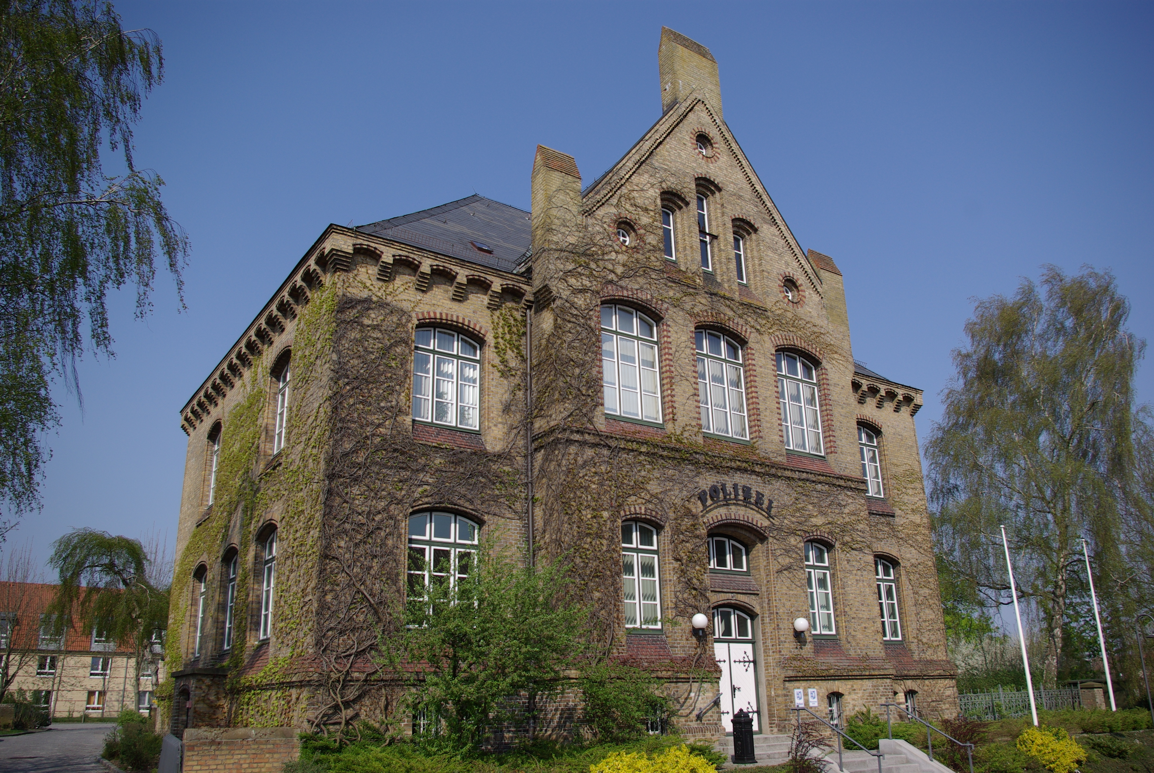 Kappeln in Schleswig-Holstein. Das Gebäude des ehemaligen Amtsgerichtes steht unter Denkmalschutz. Heute ist in dem Gebäude die Polizei und die Wasserschutzpolizei.